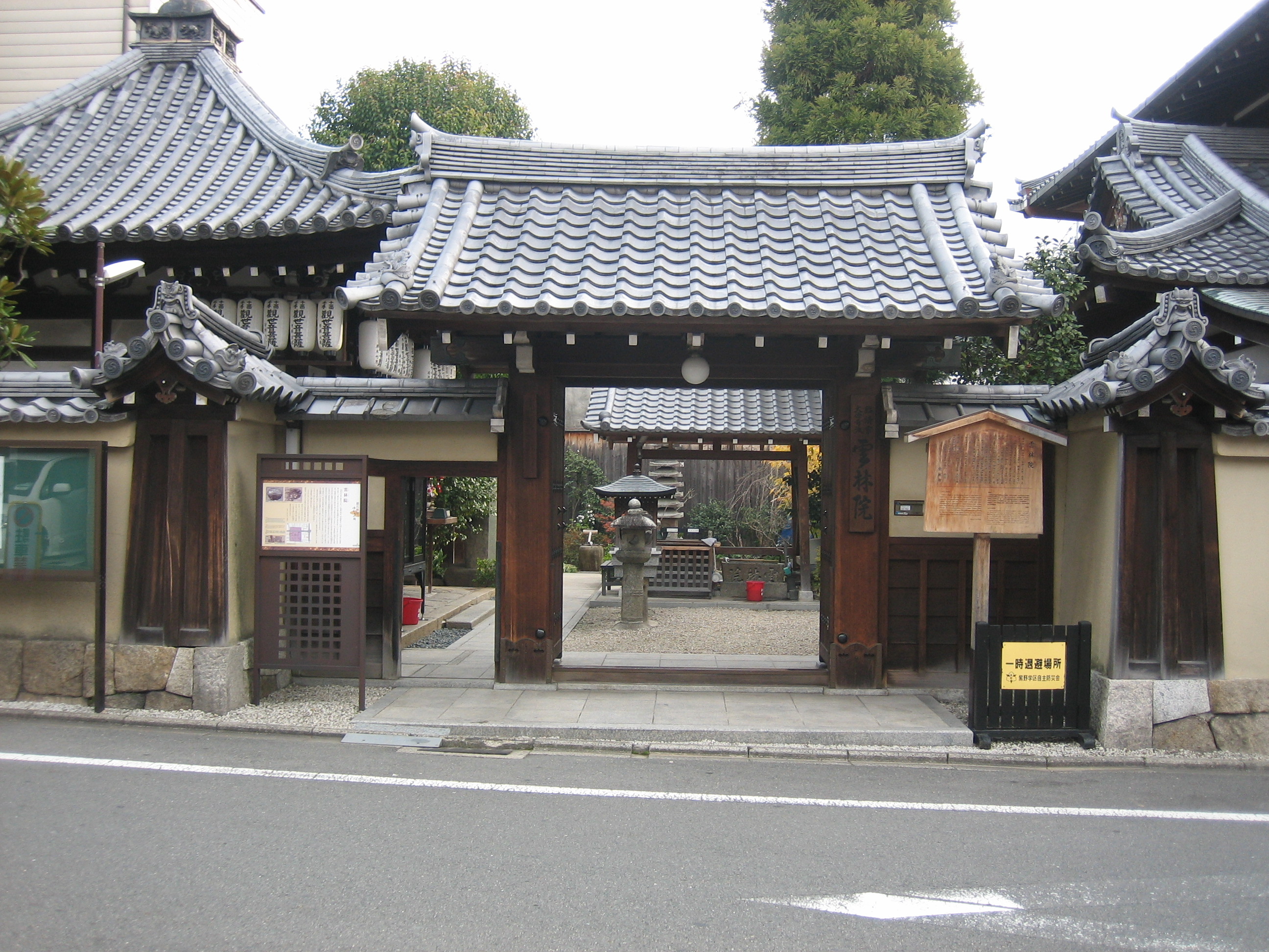 雲林院門前を京都市北区紫野雲林院町で撮影